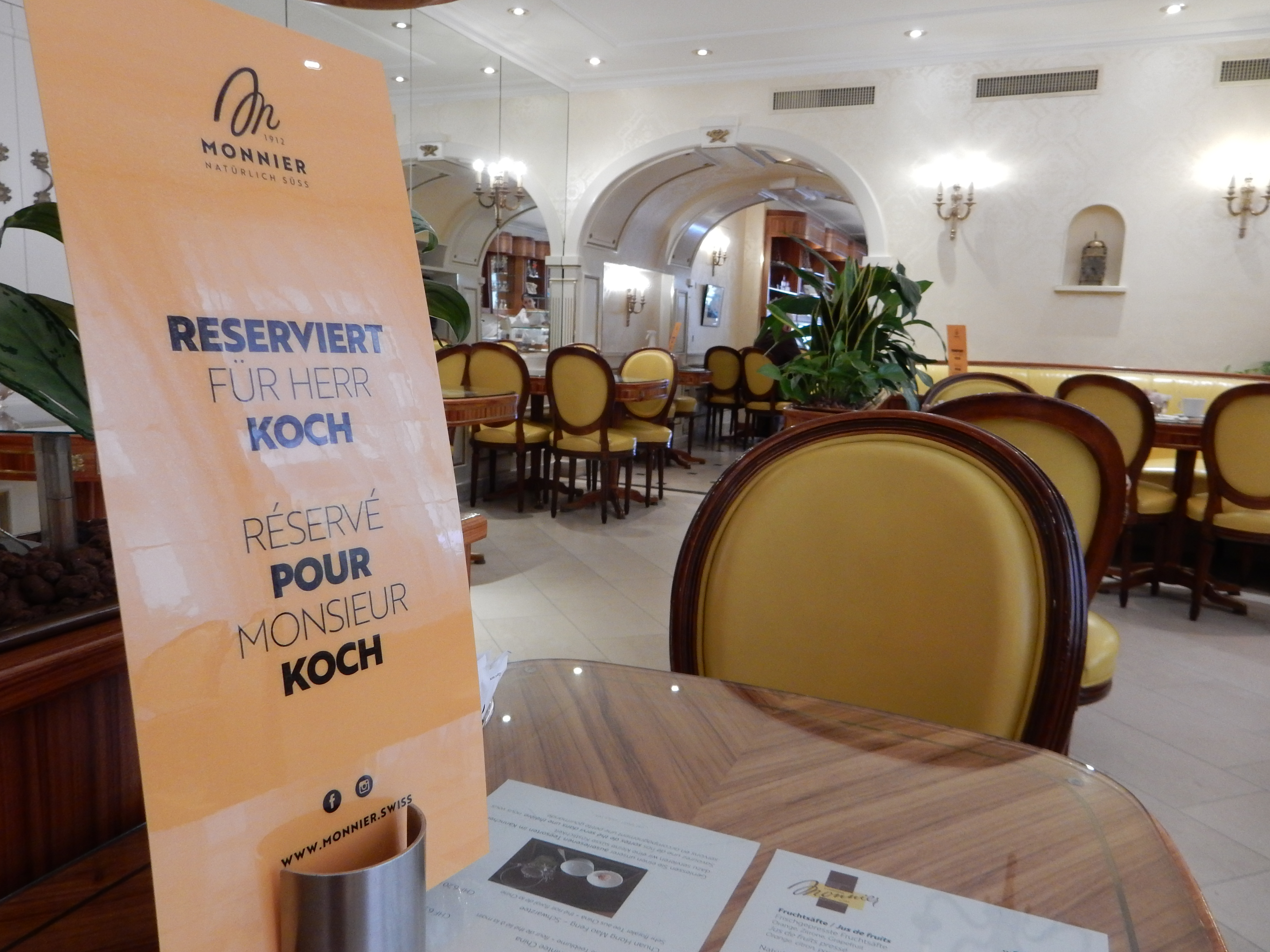 In einem Restaurant ist jeder zwei Tisch bezeichnet mit "Reserviert für Herr Koch" in Anspielung auf den Schweizer Pandemie-Experten Daniel Koch. Standort Monnier Murten.